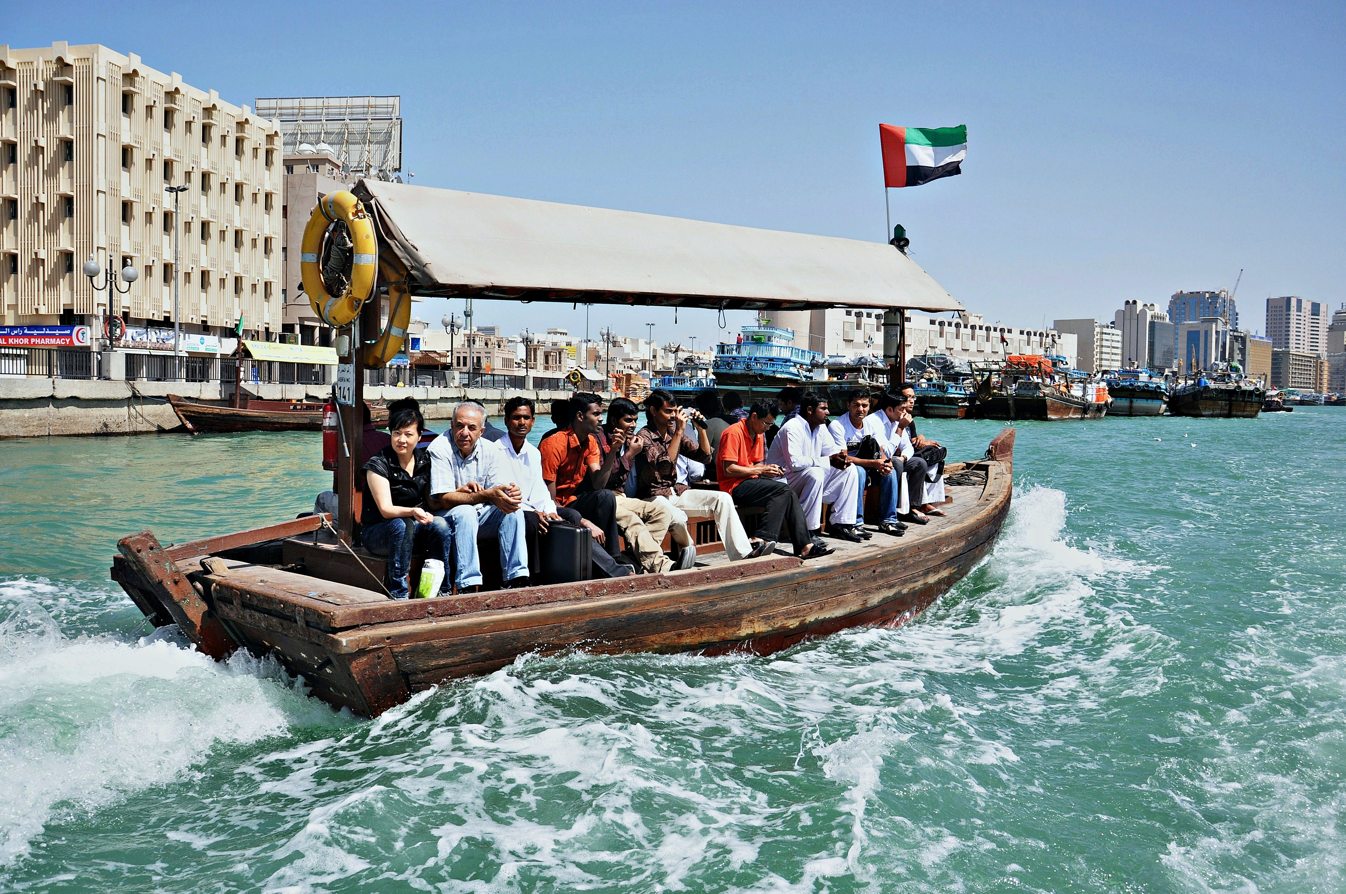 emiratos arabes